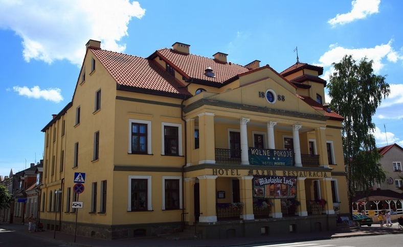 Mikołajki - Hotel Mazur, Pl. Wolności 6